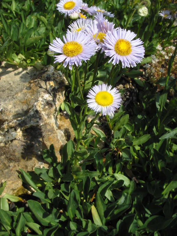 Erigeron pulchellus, Jardin alpin, Jardin des Plantes de Paris